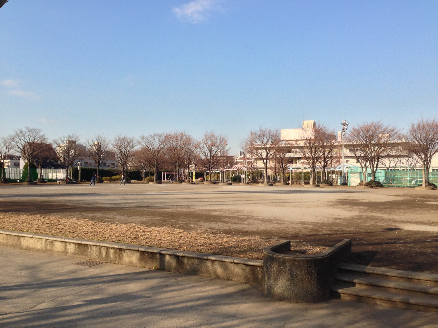 東京都新宿区上落合にある区立公園。落合水再生センターの近く。